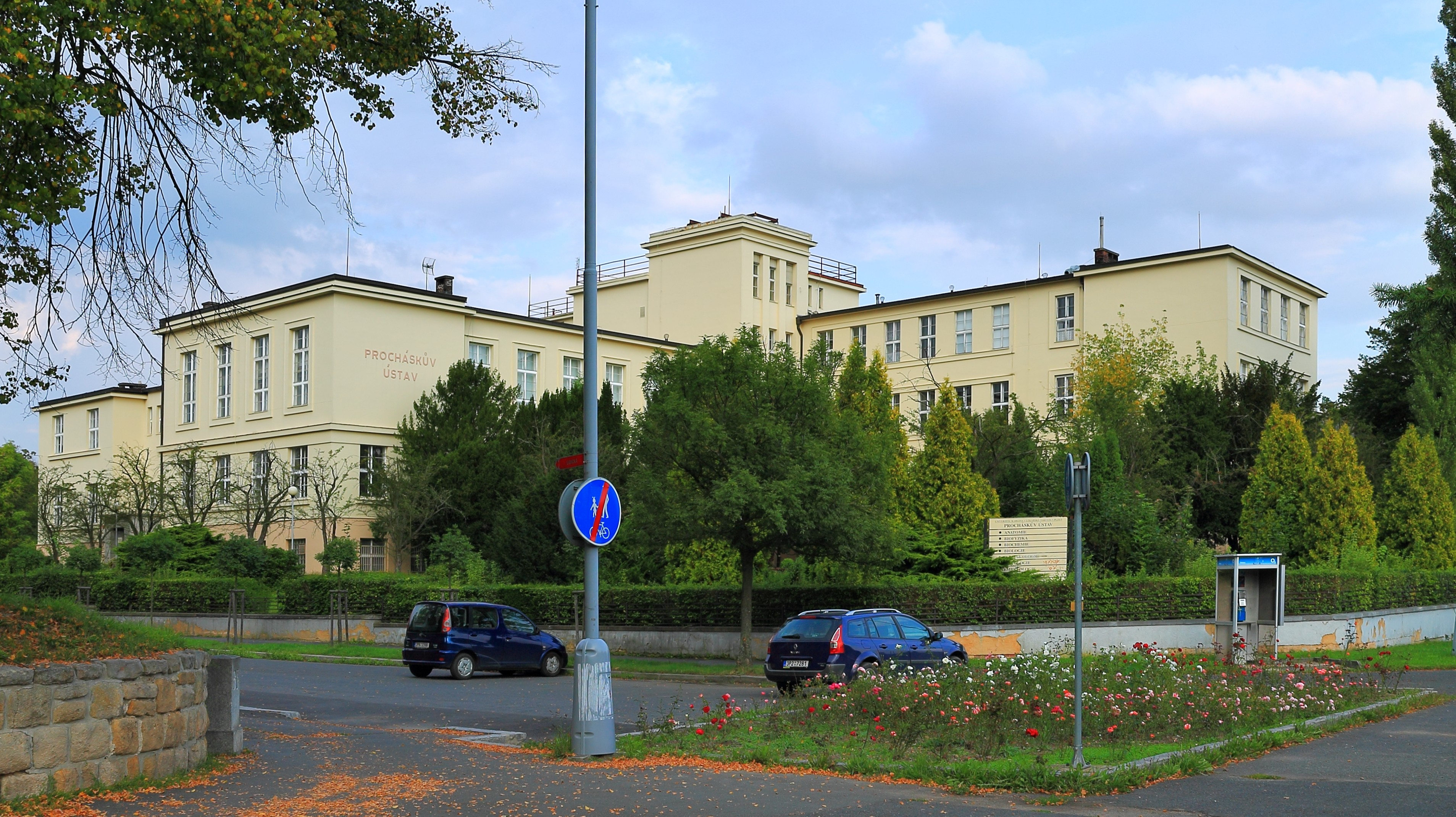 Procházkův výzkumný ústav, Plzeň 1-Severní Předměstí, Karlovarská 585/48, Lidická 585/2, Plzeň.